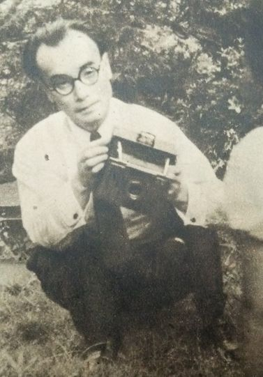 神西清